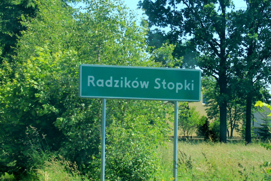 Radzików-Stopki - wieś w Polsce położona w województwie mazowieckim, w powiecie siedleckim, w gminie Mordy.